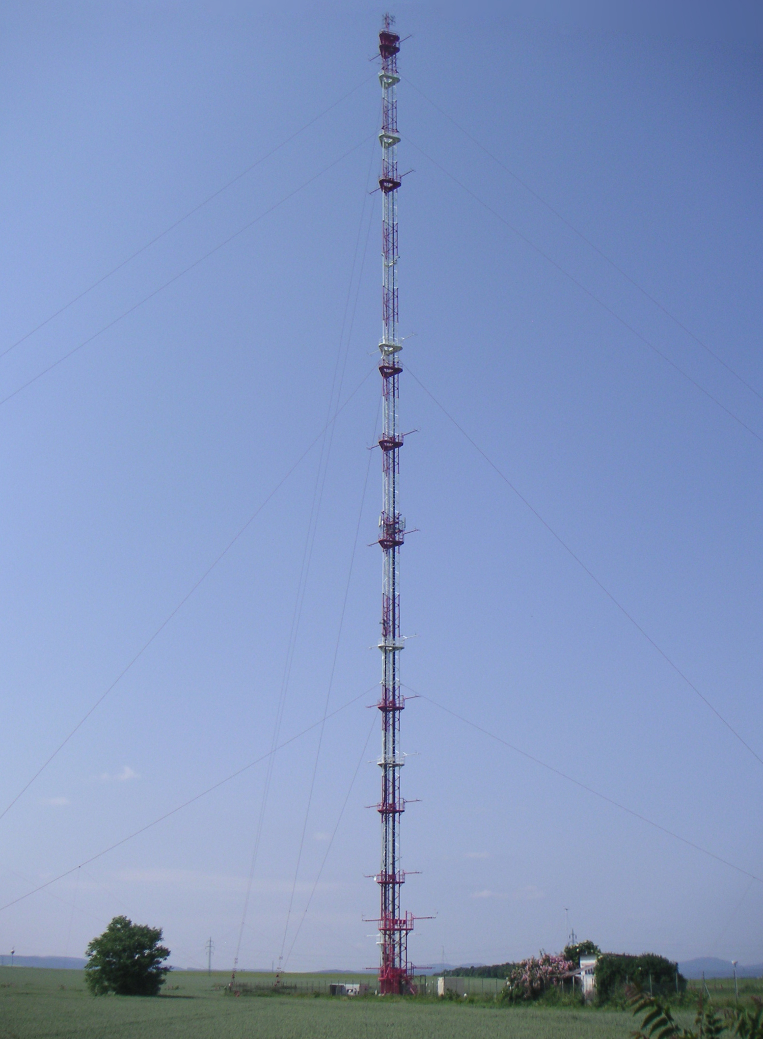 Meteorologická stanica v Jaslovských Bohuniciach